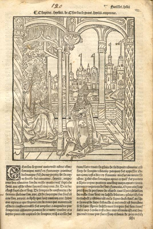 Iconographie illustrant l'incunable "La Mer des Histoires" publié en 1488.